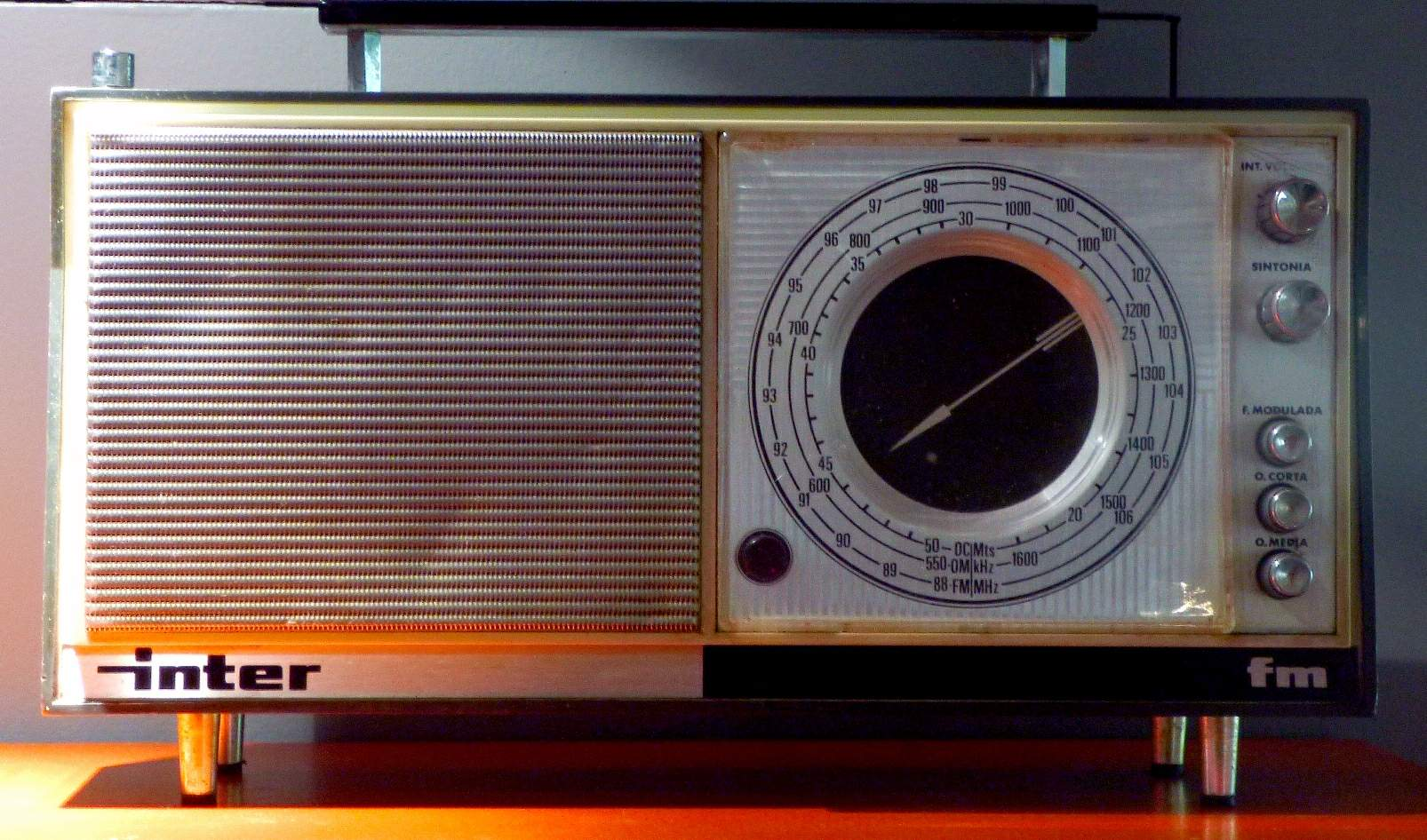 Logroño - Casa de las Ciencias - Exposición '100 años de periodismo en La Rioja' - radio Inter 1968